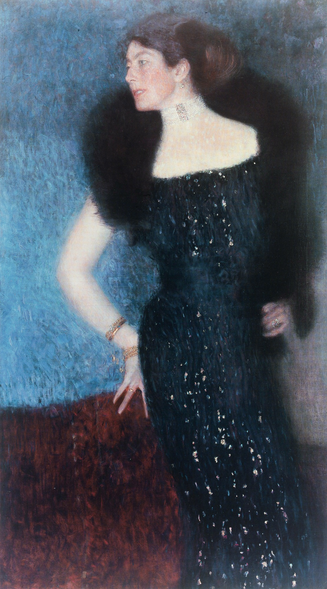 cropped